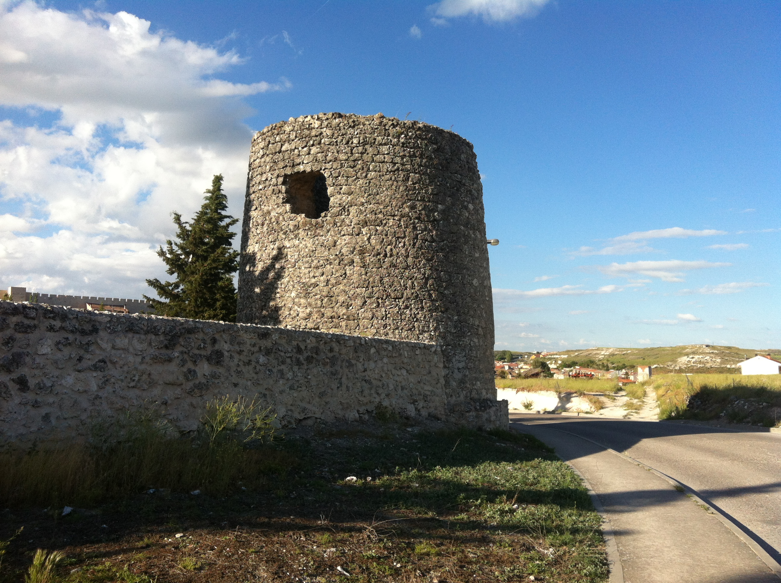 Antiguo molino de viento, conocido como El Cubo (Cuéllar, Segovia).